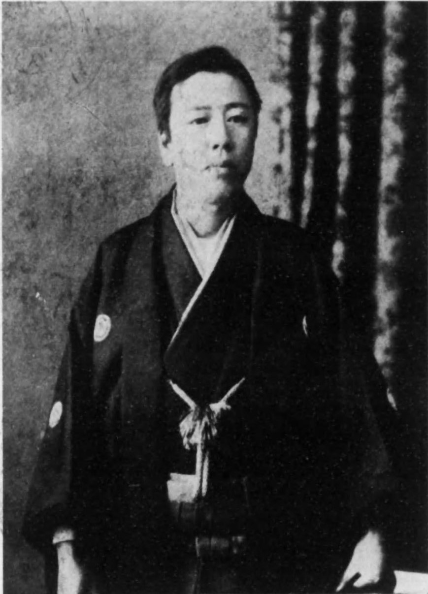 市島謙吉（1860～1944）